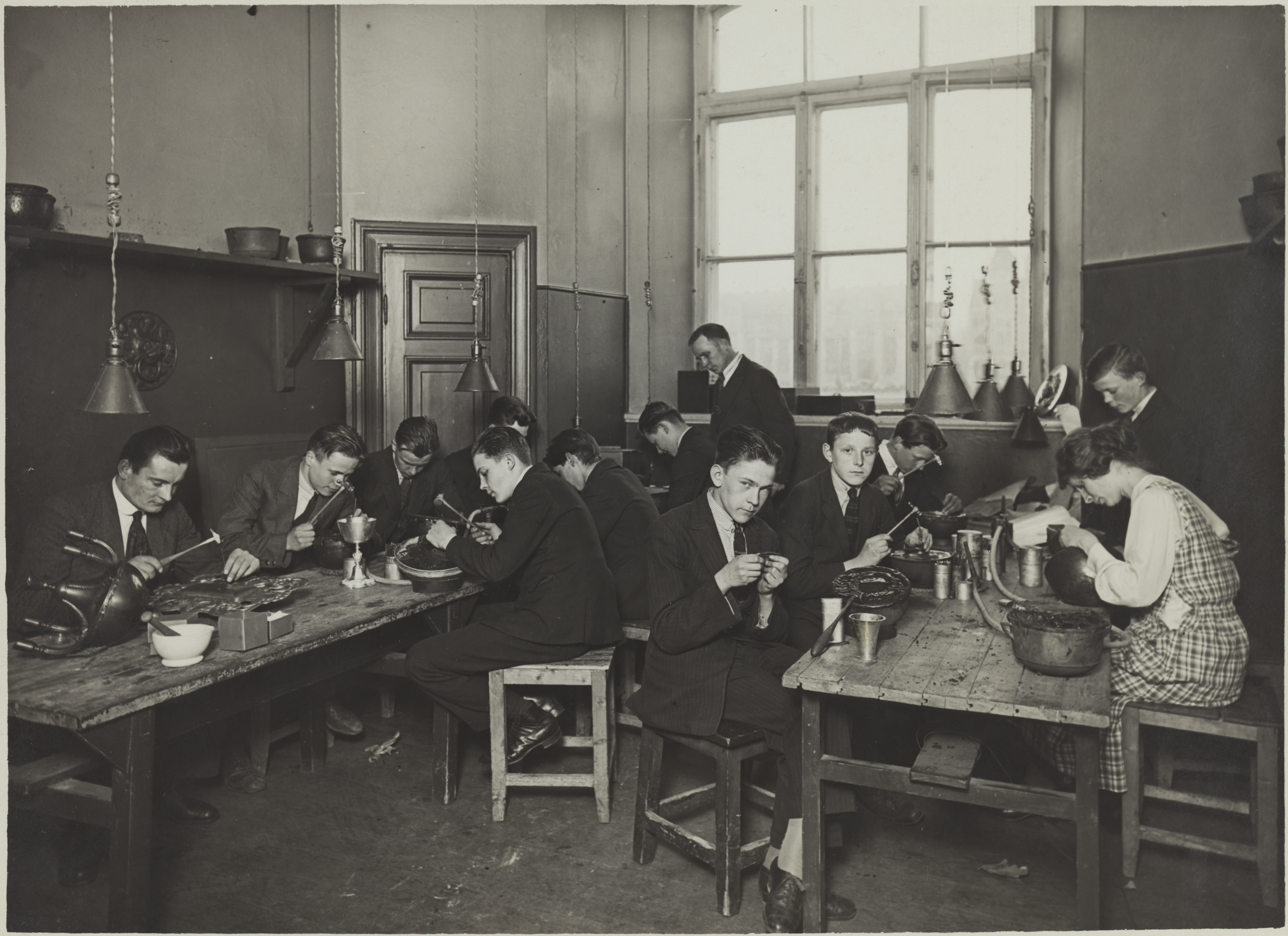 Metallintaonnan opetustilanne, 1920-luku. Opettaja Paavo Tynell. Taideteollisuuskeskuskoulun opetustilanteita. Aalto-yliopisto / Aalto University Tiedätkö lisää tästä kuvasta? Jätä kommentti tai ota yhteyttä sähköpostitse: Lisätietoja kuvakokoelmista / more information